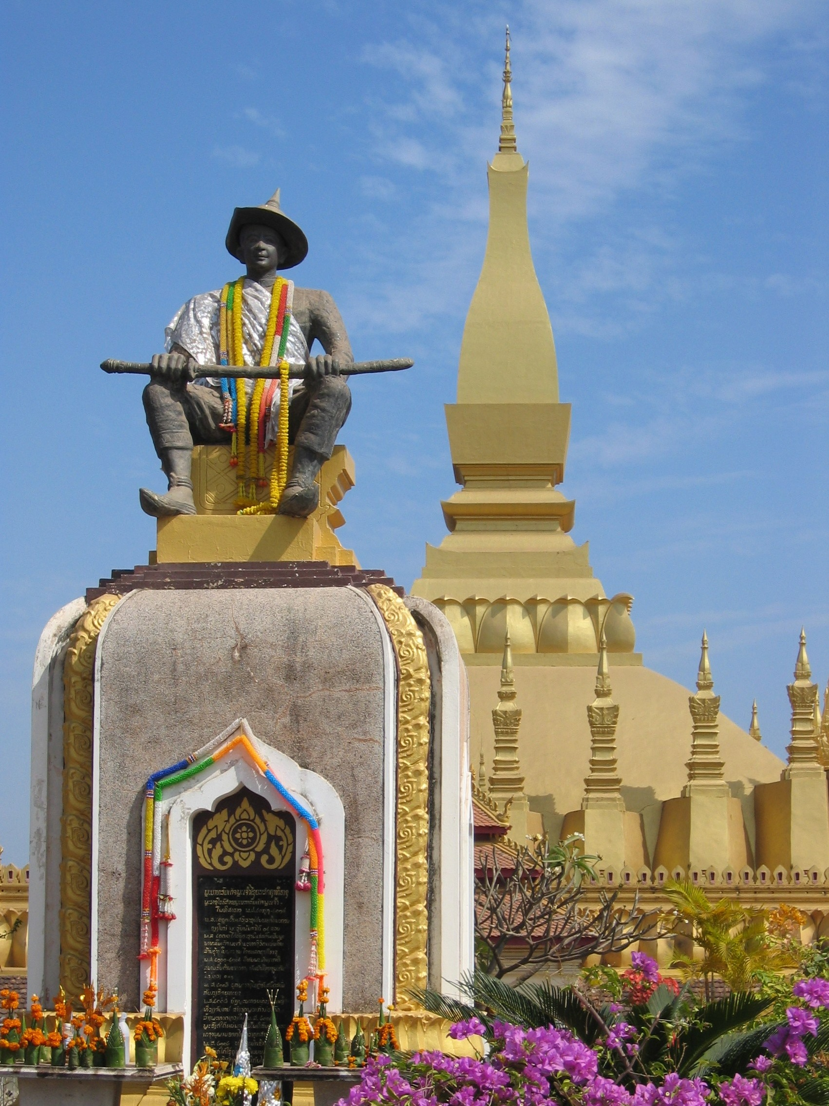 Tempel Pha That Luang mit Statue Setthathirat Vientiane Laos